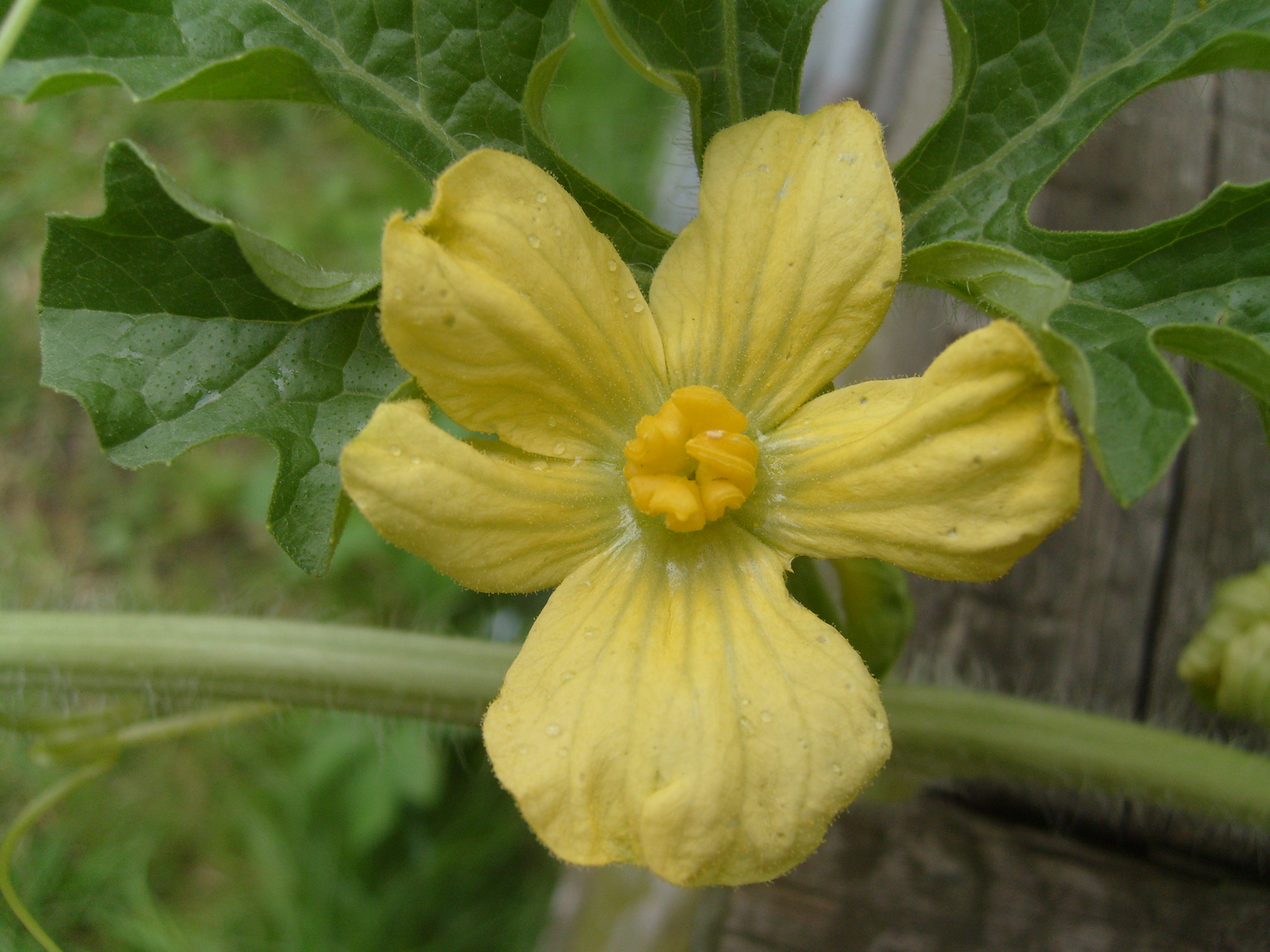 Květ melounu (Citrullus lanatus)